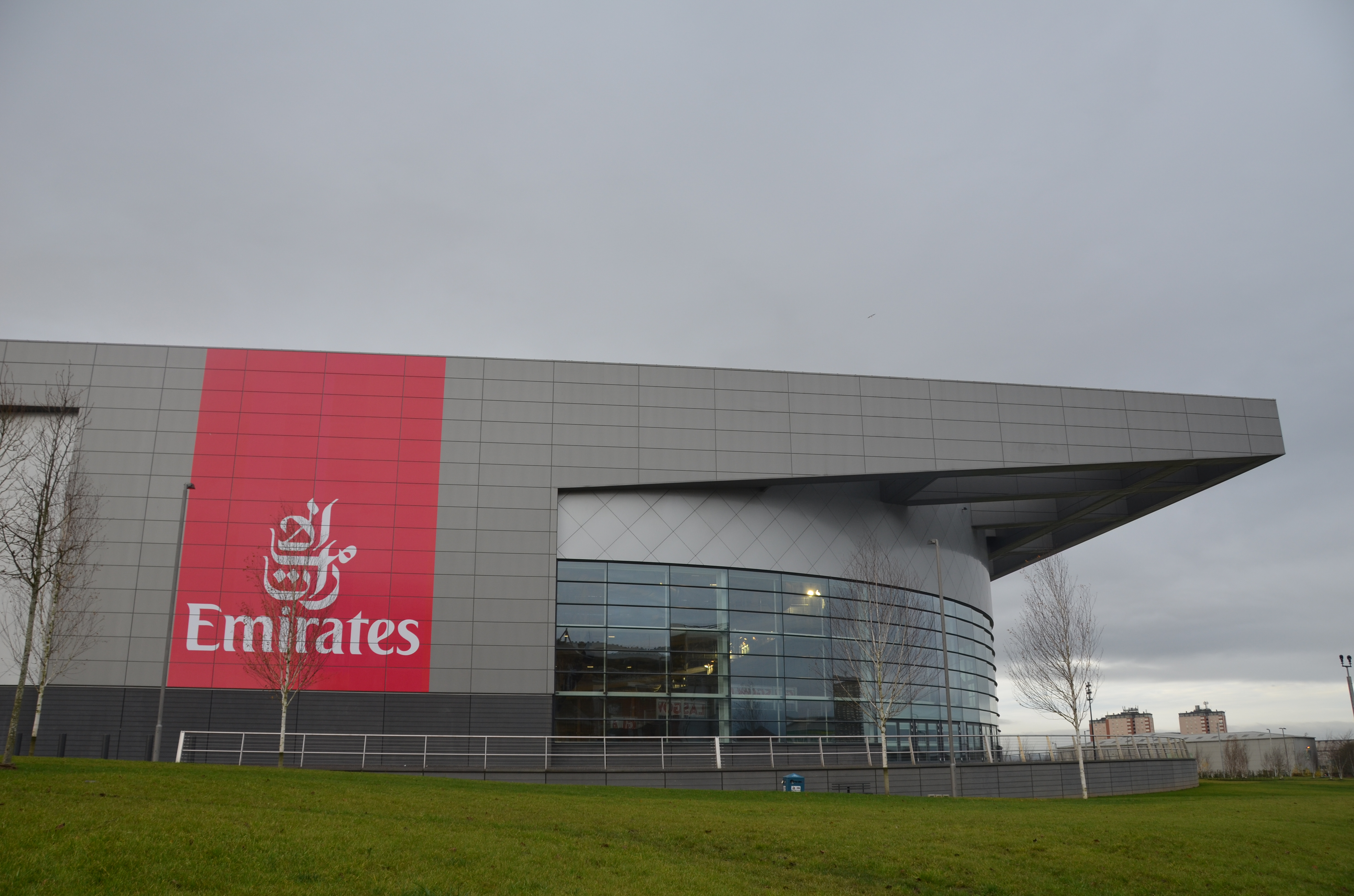 Sir Chris Hoy Velodrome, Bahnrad-Weltcup 2012